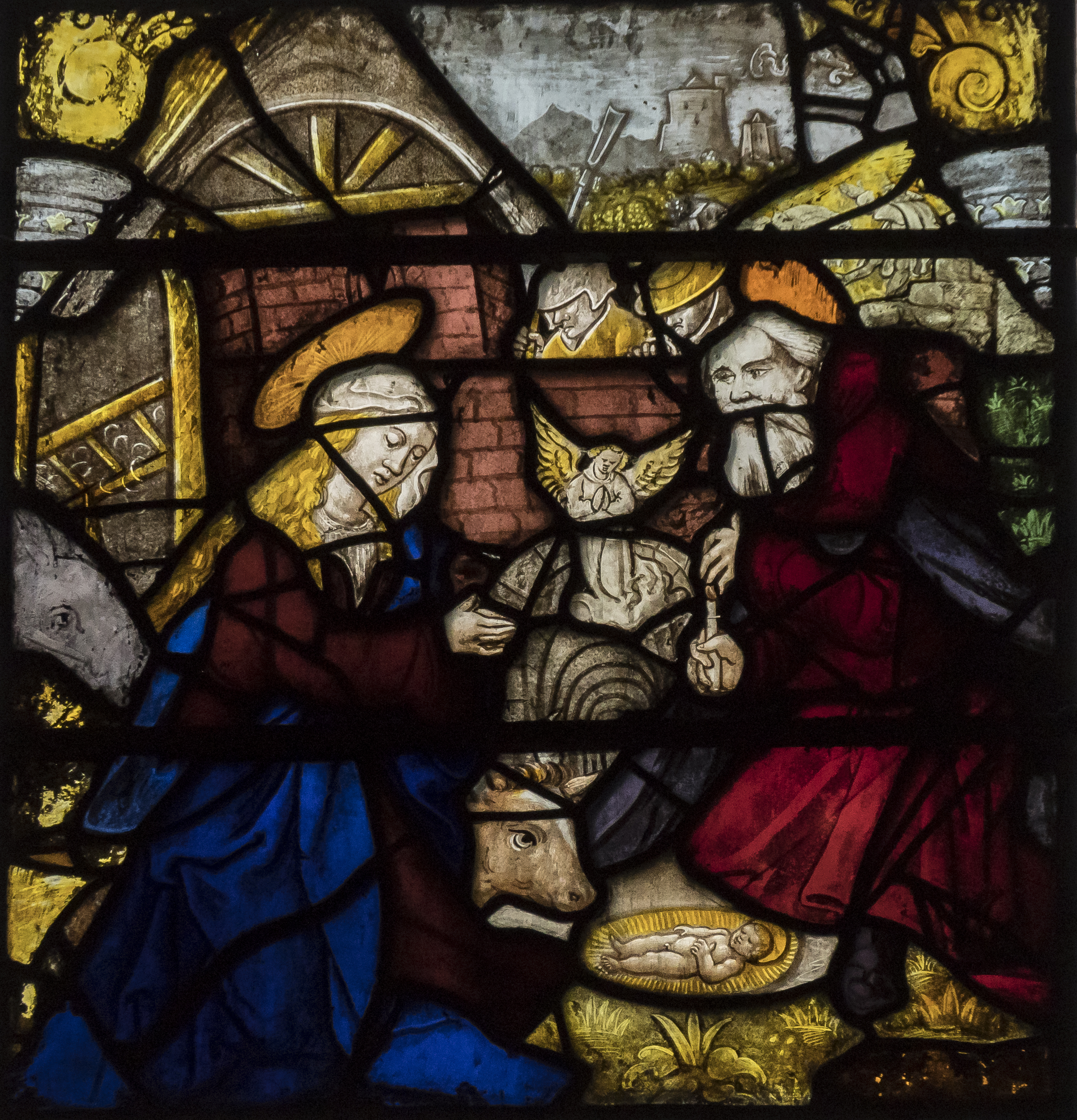 York Minster glass